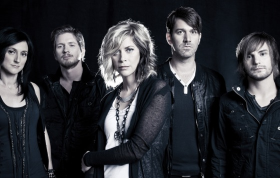 rock band from florida